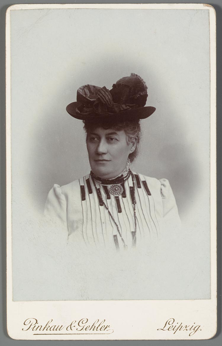 Cornélie Lydia Huygens